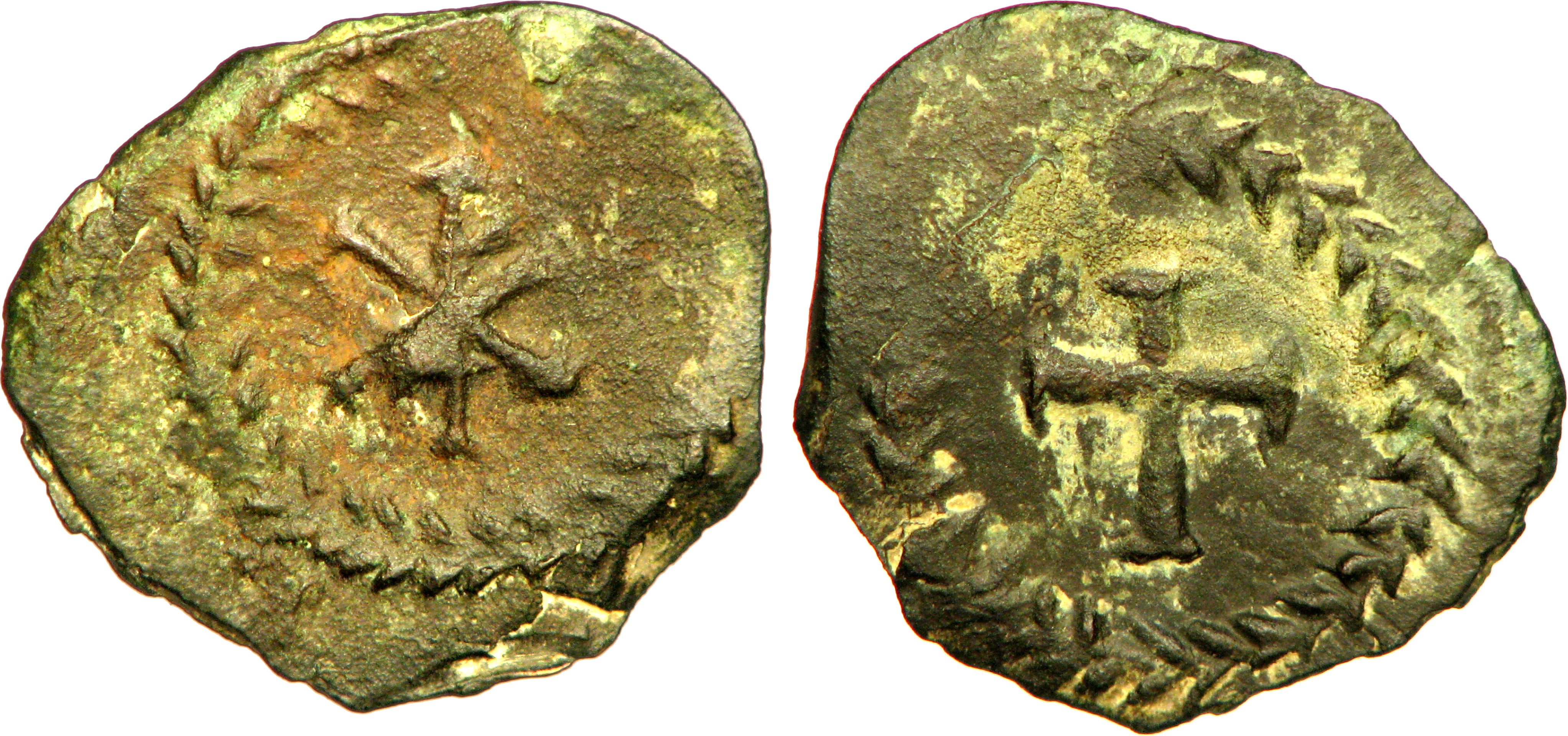 Nom de l'atelier/ville : Marseille (?) Métal : cuivre Diamètre : 16,00mm Axe des coins : 12h. Poids : 1,22g. Degré de rareté : R3 Description avers : Chrisme dans une guirlande végétale. Description revers : Croix dans une guirlande végétale. Commentaire à propos de cet exemplaire : Les monnaies de cuivre sont rares dans le monnayage mérovingien. Les seules vraiment bien classées sont celles de Marseille, avec un nom de roi.